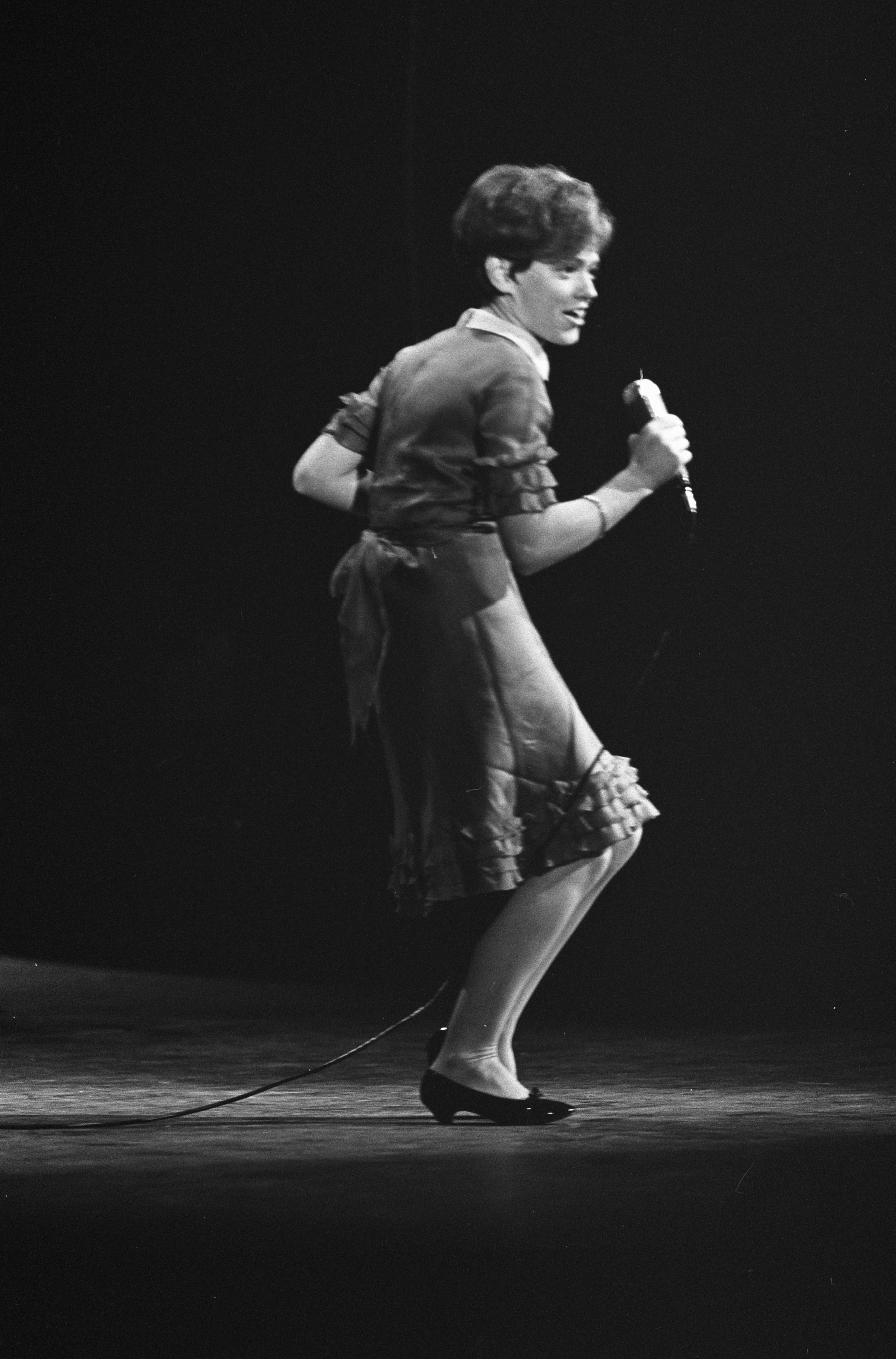 Collectie / Archief : Fotocollectie Anefo Reportage / Serie : [ onbekend ] Beschrijving : Grand Gala du Disque 1965 , Rita Pavone Datum : 2 oktober 1965 Locatie : Amsterdam Trefwoorden : muziek, muziekprijzen, zangeressen Persoonsnaam : Pavone, Rita Fotograaf : Koch, Eric / Anefo Auteursrechthebbende : Nationaal Archief Materiaalsoort : Negatief (zwart/wit) Nummer archiefinventaris : bekijk toegang 2.24.01.05 Bestanddeelnummer : 918-2594